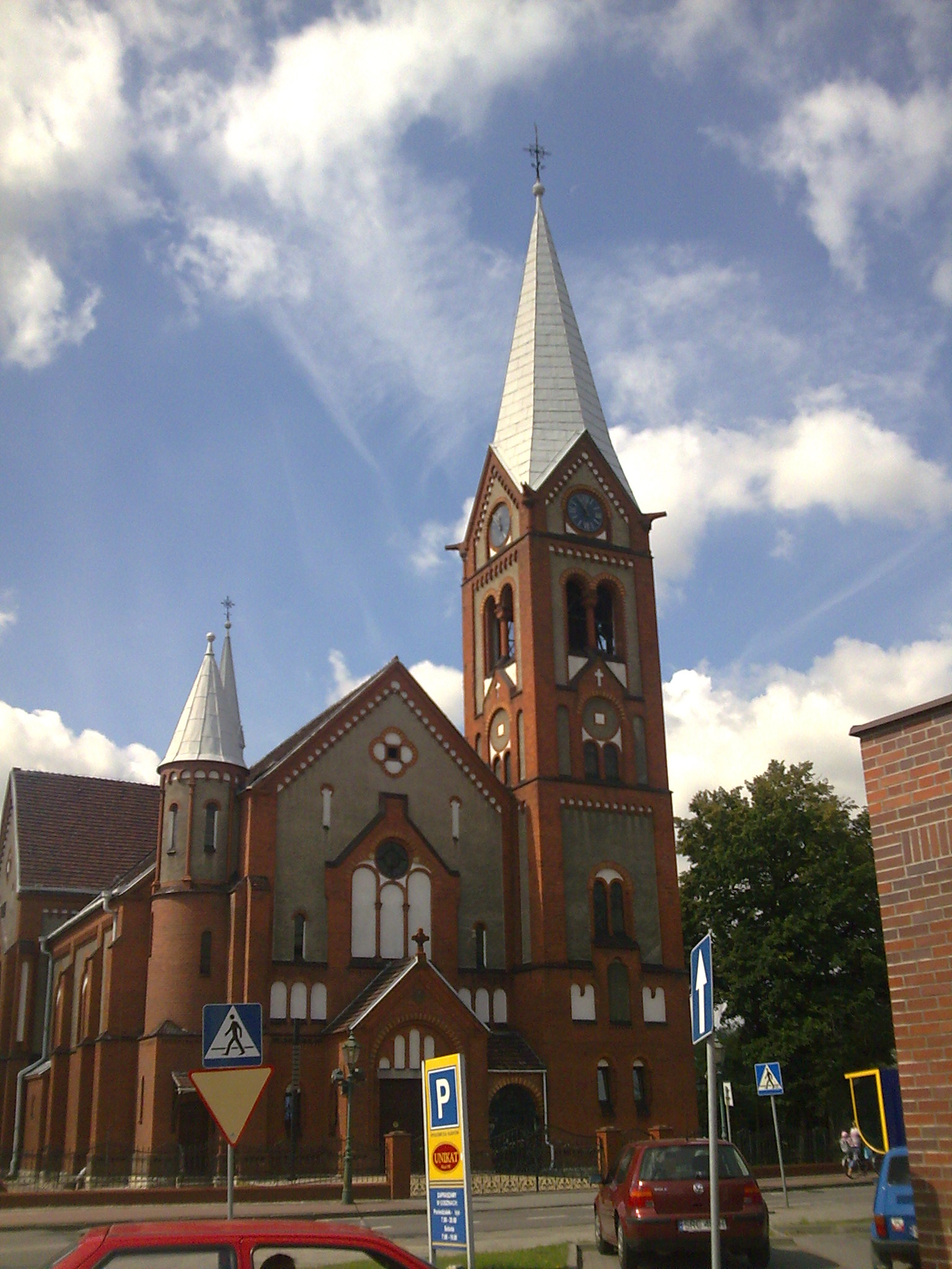 kosciół sw. Marii Magdaleny